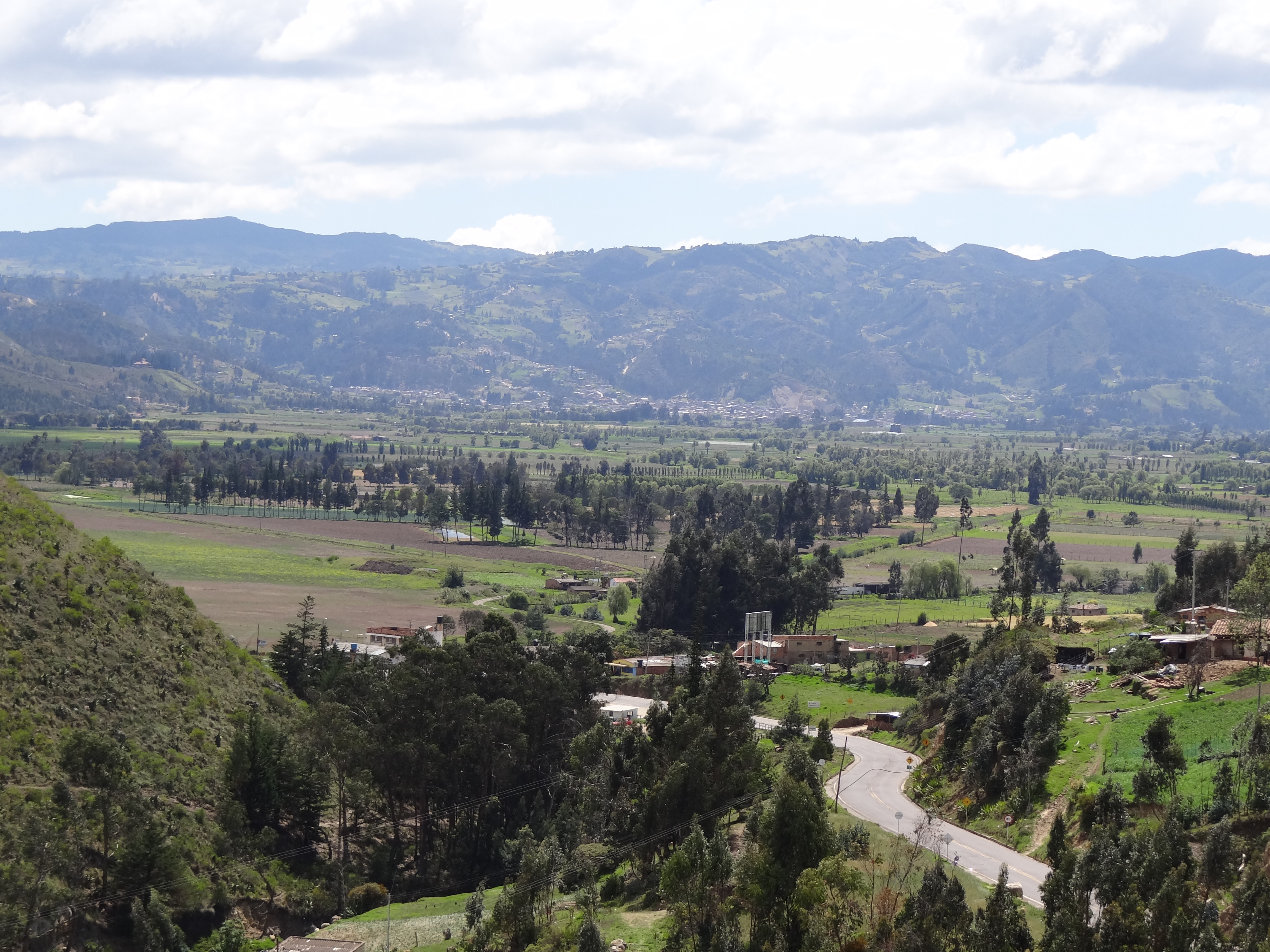 Valle de Samacá, remanente de una antigua laguna, en territorio del municipio de Samacá, departamento de Boyacá, Colombia